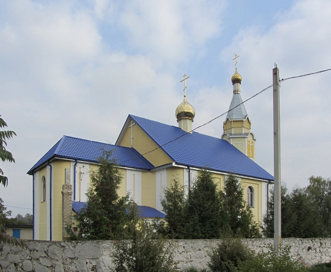 Краявіды Воўчына